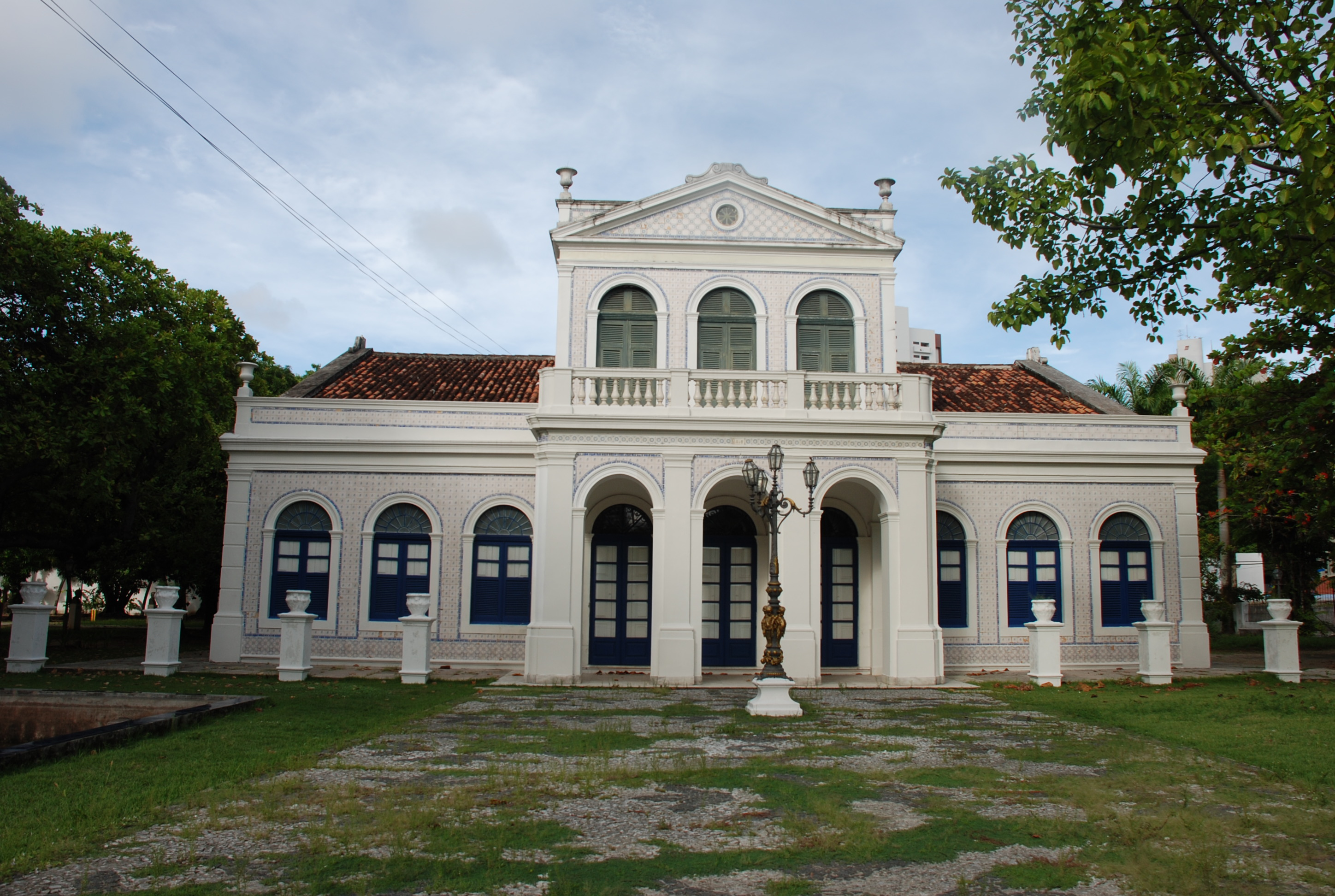 Sede da Academia Pernambucana de Letras